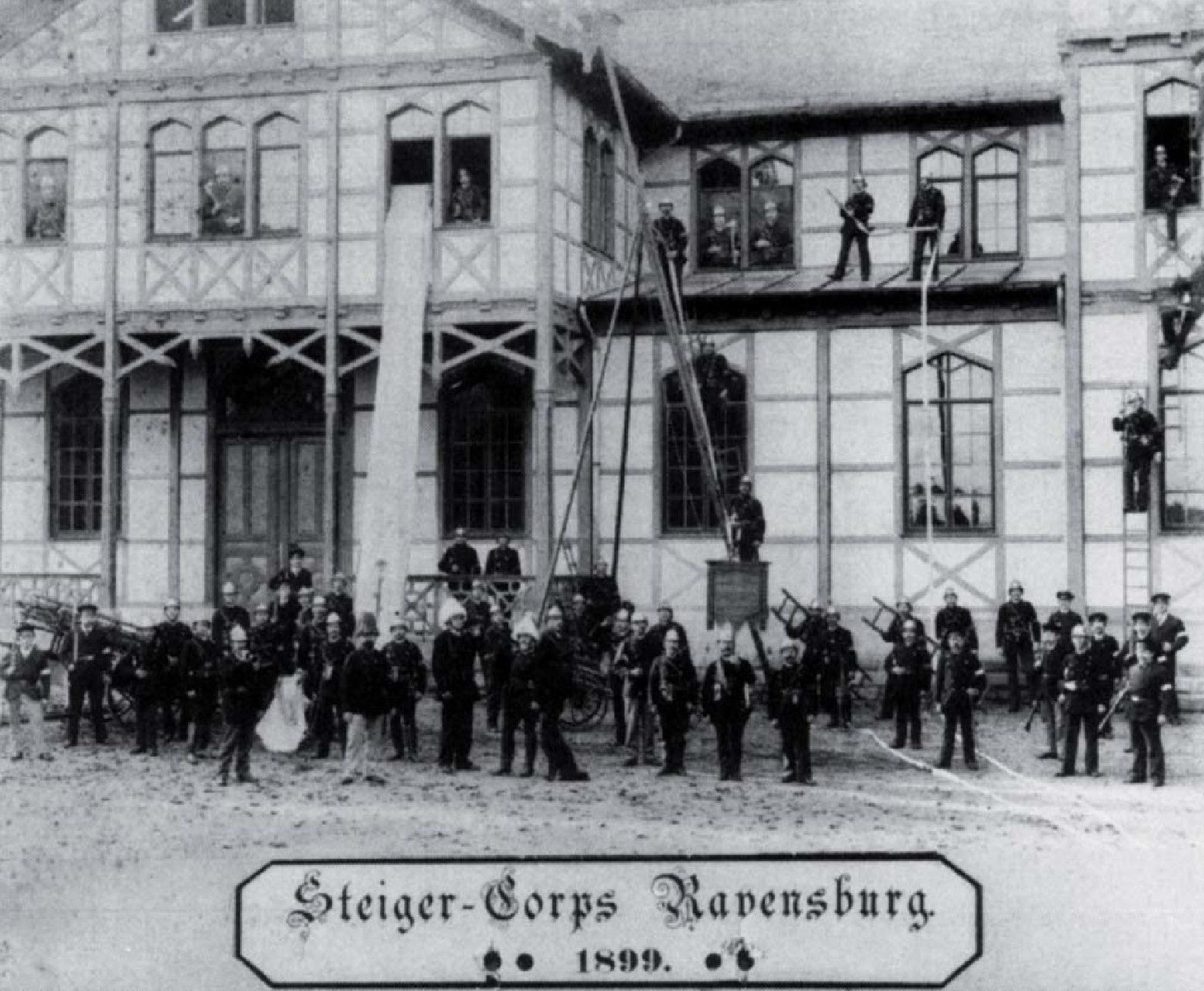 Übung des Steigerkorps an der Kuppelnau-Turnhalle im Jahr 1899